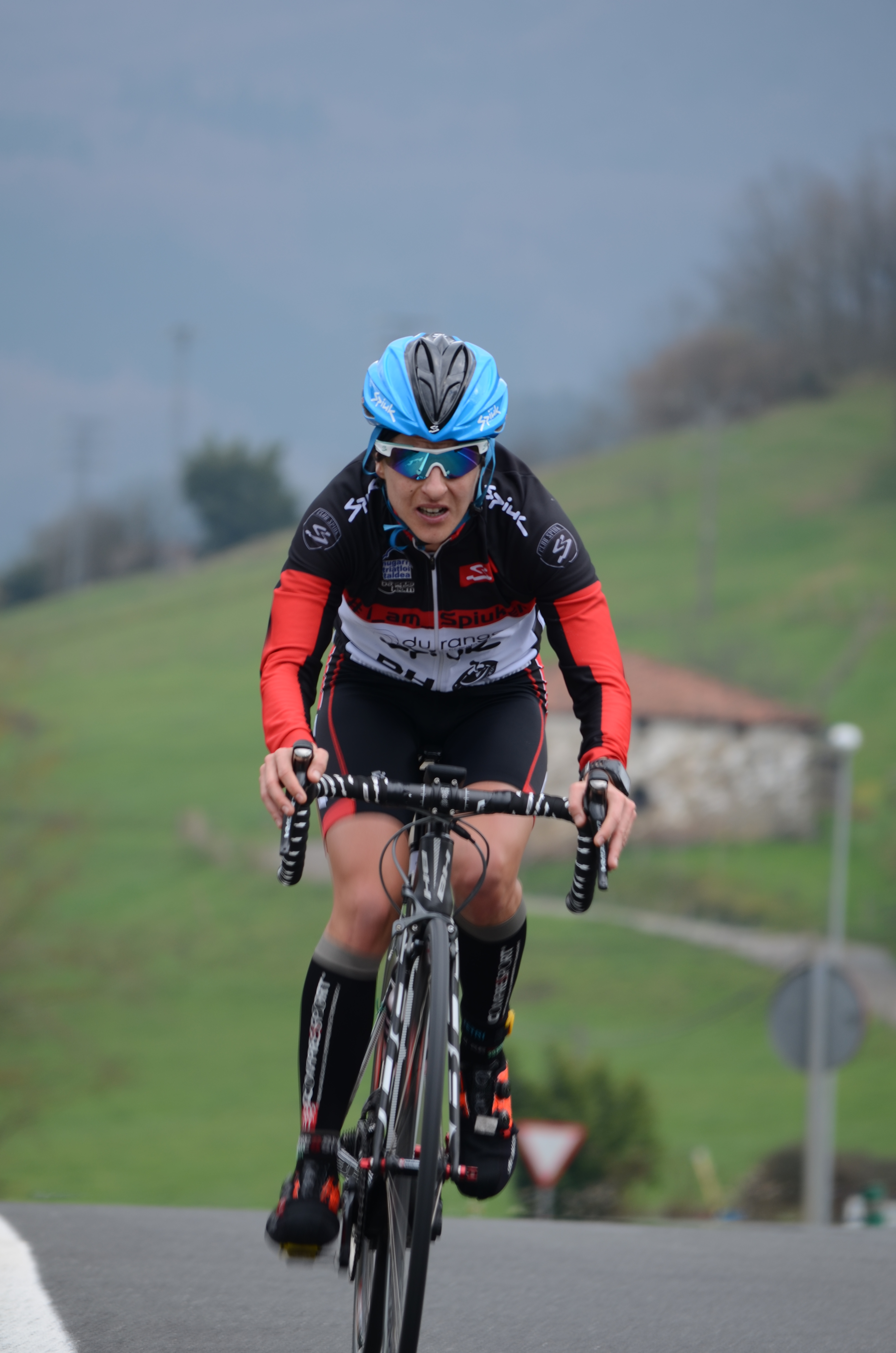 Gurutze Frades 2016ko Oñatiko duatloiean. Proba berak irabazi zuen